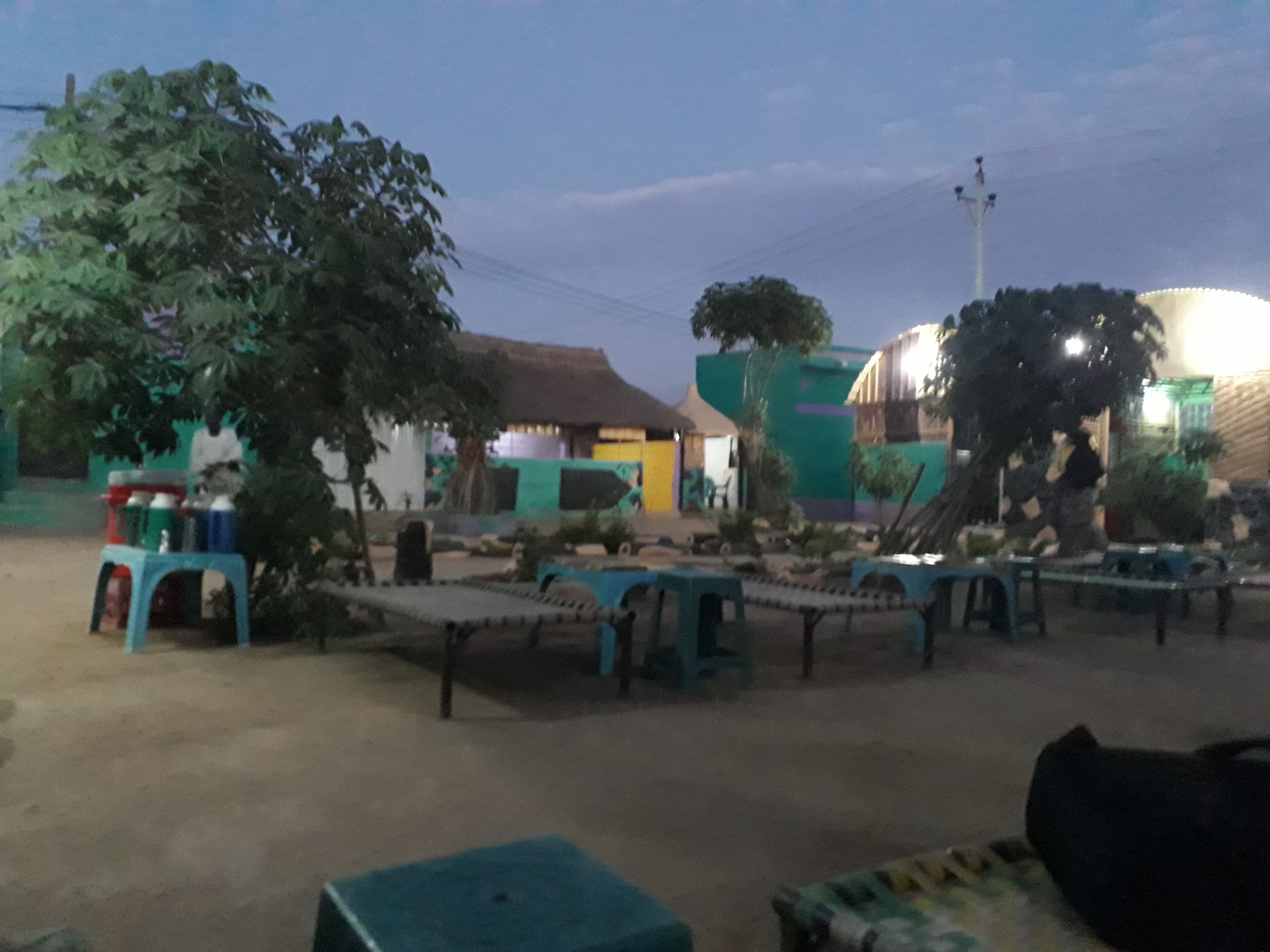 منتج للأسمال